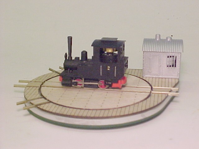 stoomlok en draaischijf Egger-Bahn